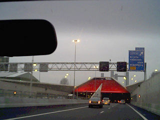 Burgemeester Thomassentunnel.